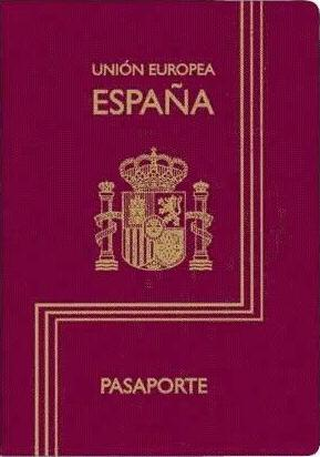 Pasaporte Espaňol